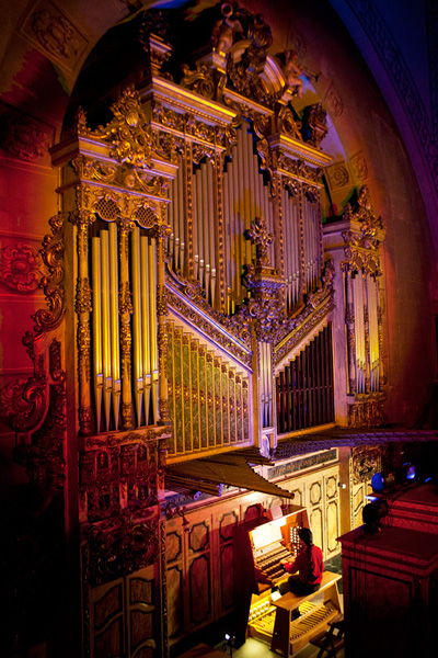 Orgue monumental de la Basílica de Santa Maria de Mataró durant el II Festival Internacional d'Orgue Jaume Isern Mataró-Barcelona.